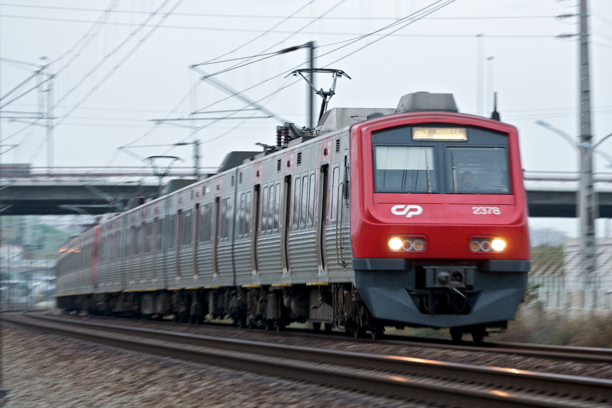 Tipo: Comboio Urbano 18404 [Alverca - Monte Abraão] Local: Santa Iria de Azóia [Linha do Norte, PK 14] Data e hora: 12 de Novembro de 2011 [07h29] Material: Automotoras 2328 e 2332 [Unidades Quádruplas Eléctricas]